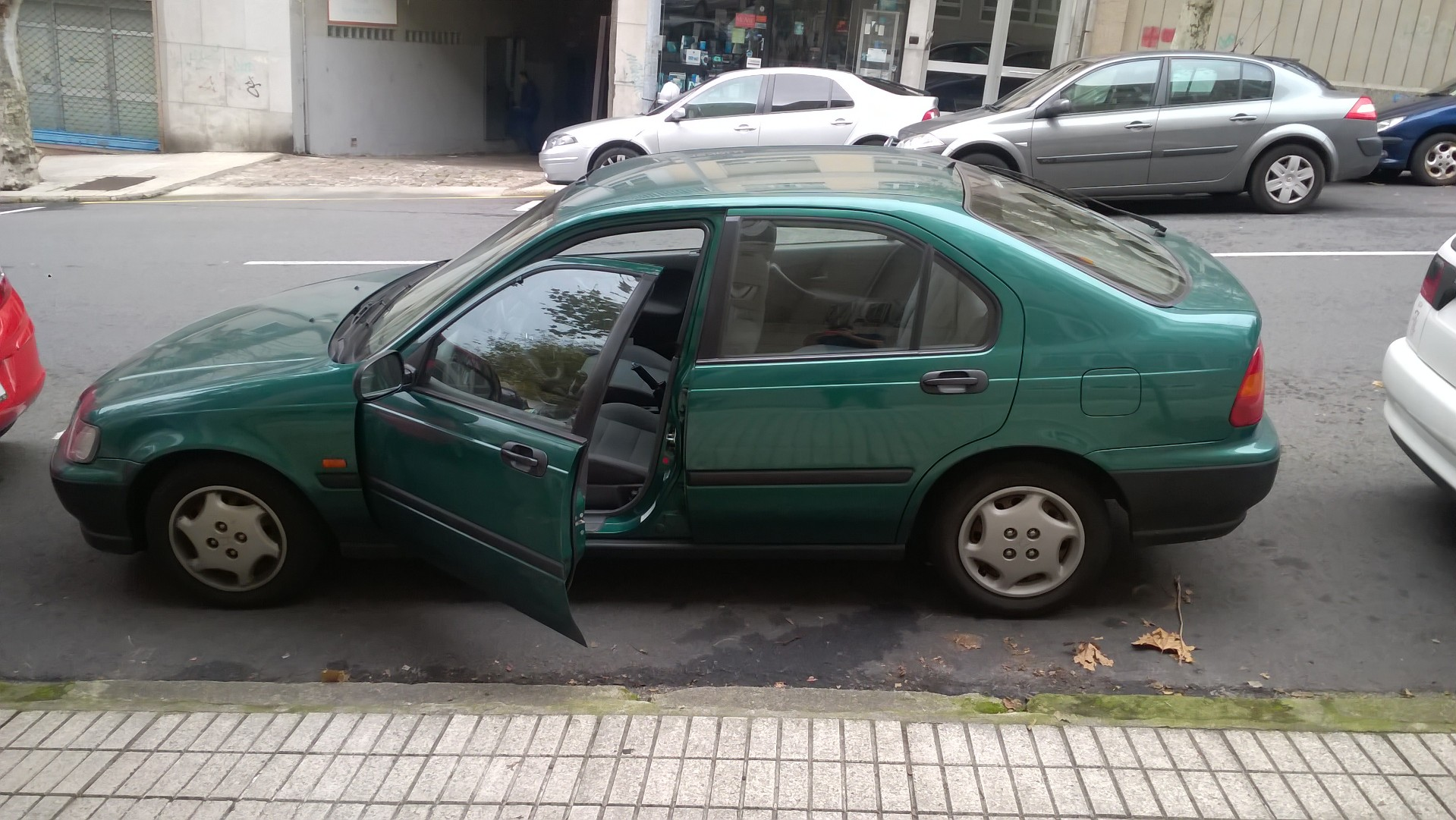 Un Honda Civic de sexta generación, unidad tipo MA9 con motorización D15Z3. En la fotografía ningún elemento original del coche ha sido alterado.